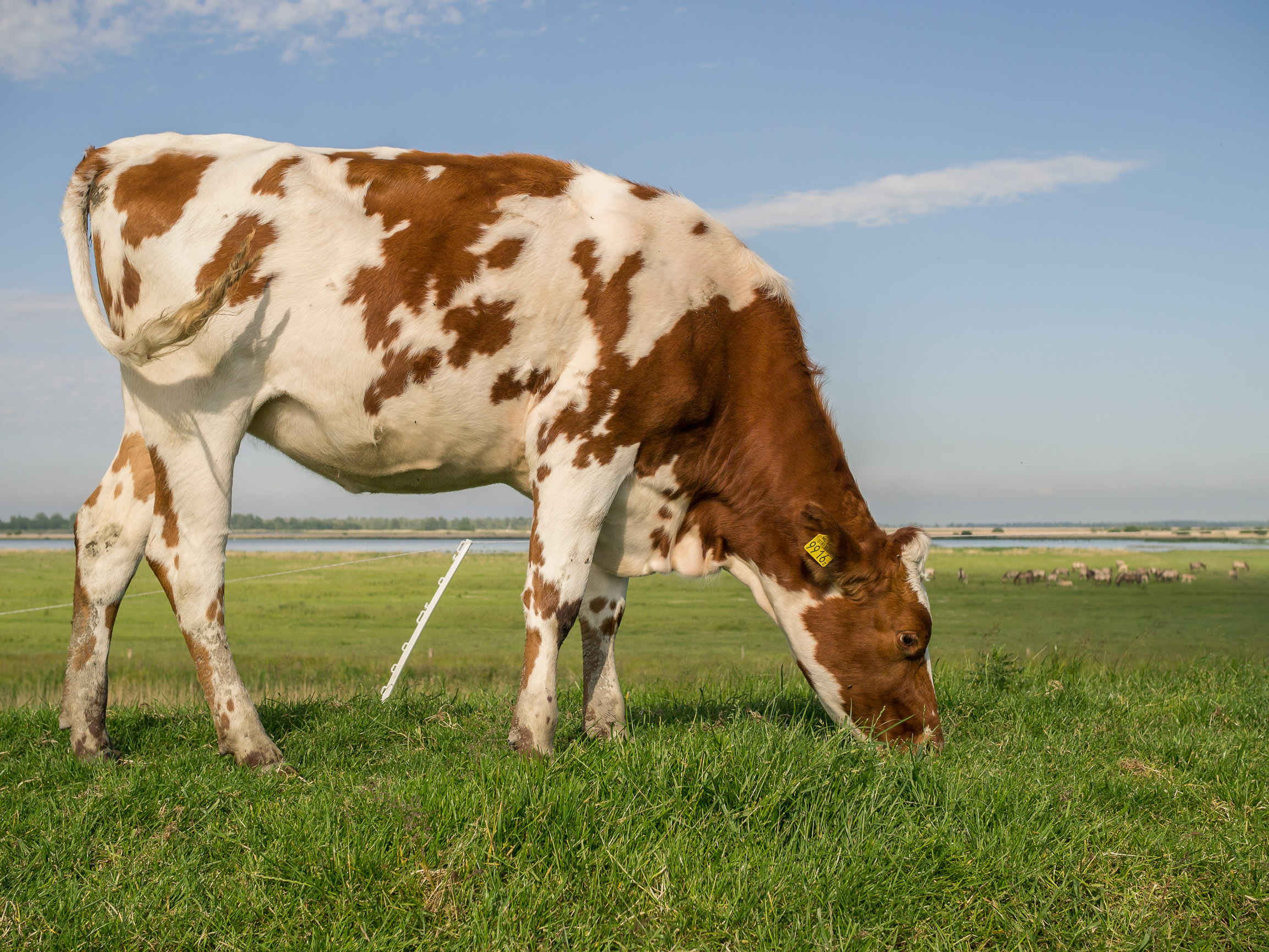 Grazen op de oude Lauwerszeedijk. Op de achtergrond een kudde konik paarden. This is a photo or sound file made in Lauwersmeer National Park in the Netherlands, with the main subject of the file in the category: animals